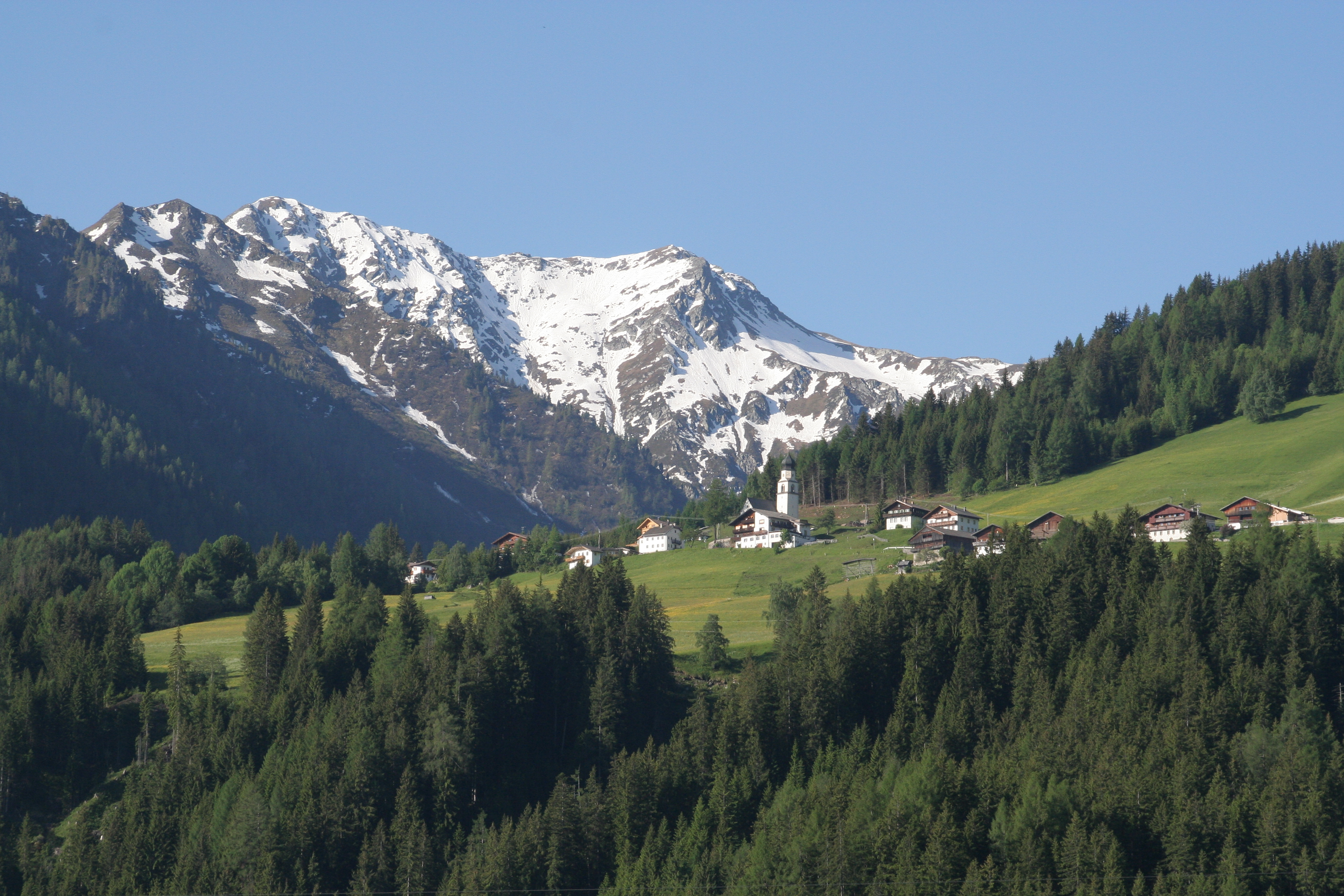 Blick aus nördlicher Richtung nach Hollbruck (1360 m), Gemeinde Kartitsch, im Hintergrund Karnischer Kamm